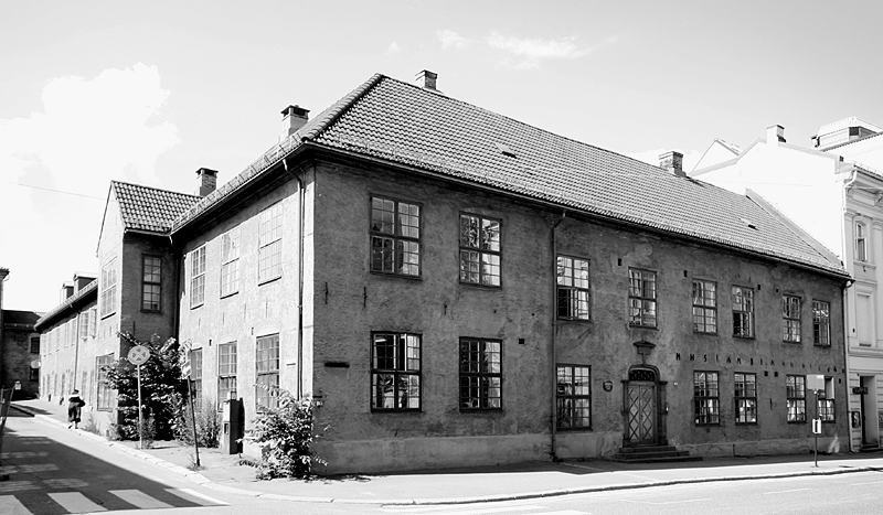 Waisenhuset, Kongens gate 1, Oslo. Built 1638, rebuilt and enlarged 1640. Rebuilt 1871 by Jacob Nordan and 1920 by Arnstein Arneberg.